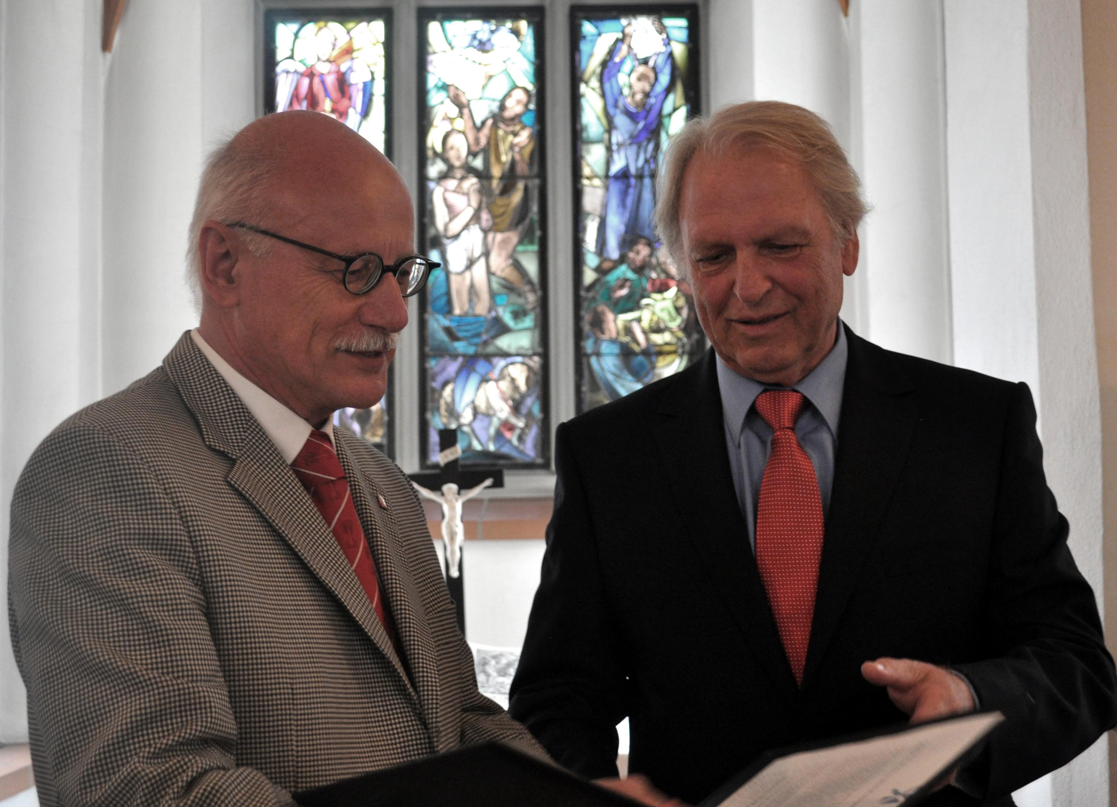 Elmar Kuhn und Winfried Aßfalg